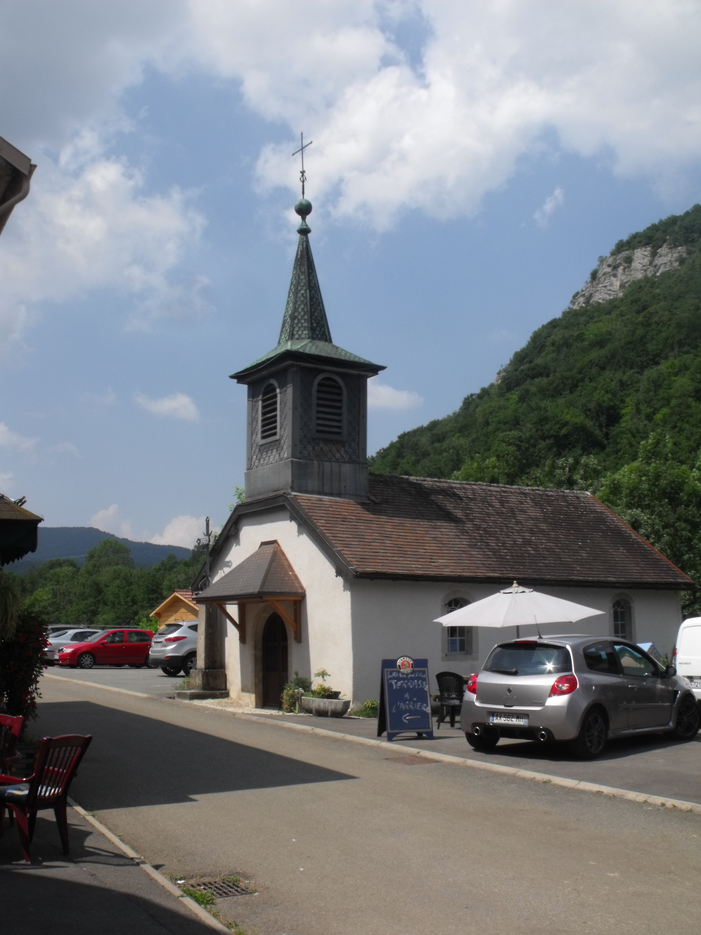 Chapelle dans le village de Bief, Doubs, France